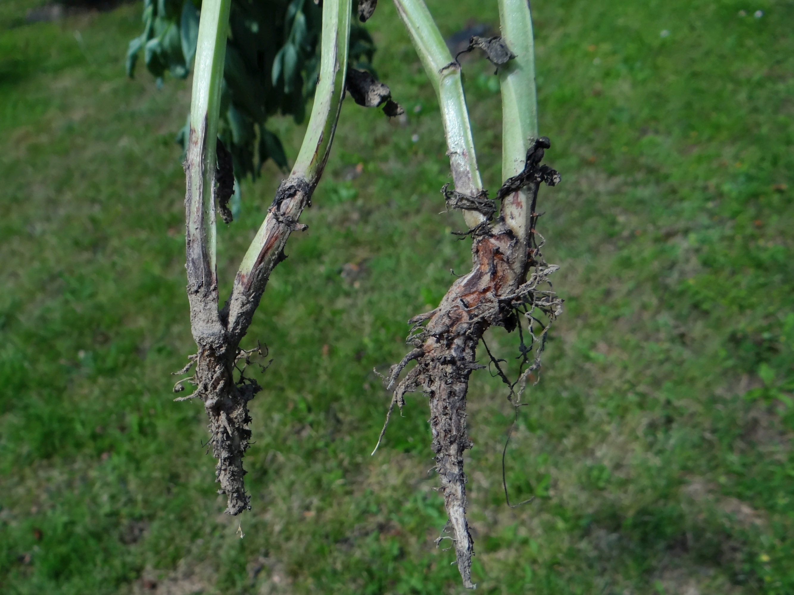 Fusarium sp. on Vicia faba